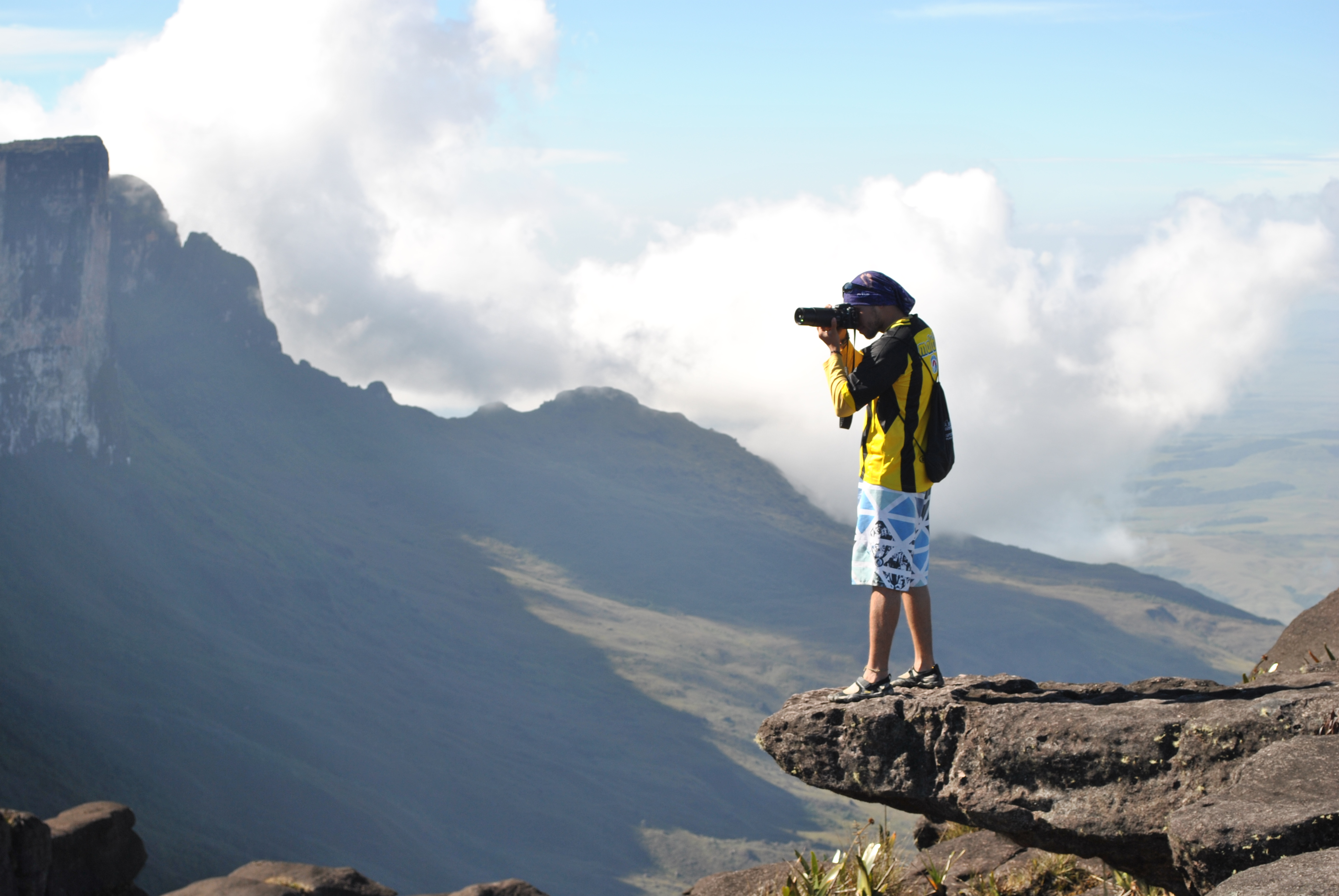 Capturando la majestuosa belleza del Roraima Tepui desde su cumbre.